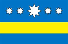 Флаг Великобелозерского района